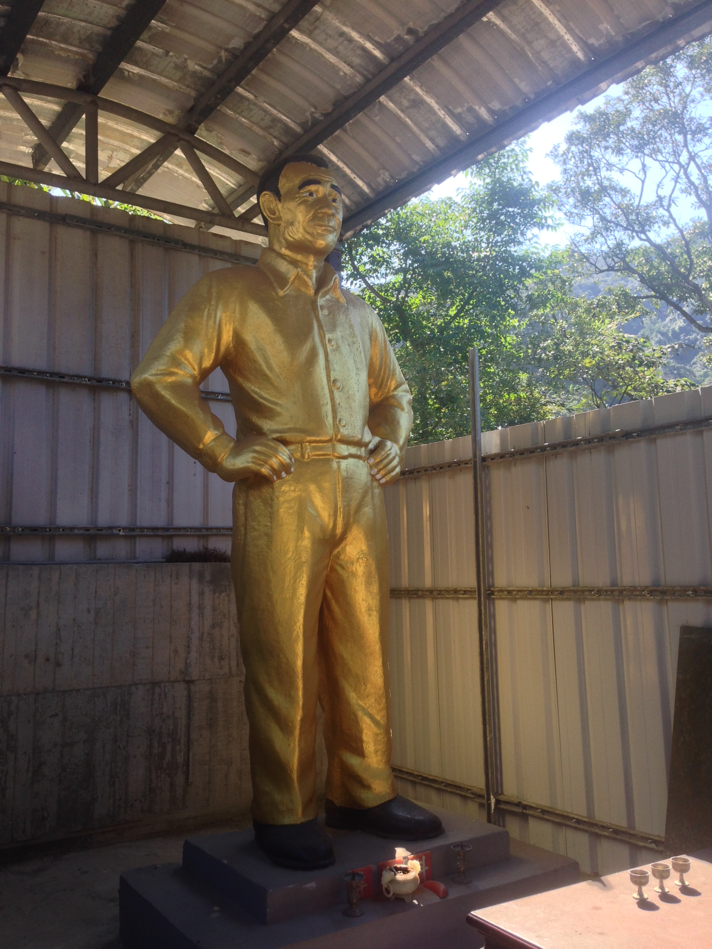 中文（台灣）: 無天禪寺李師科像